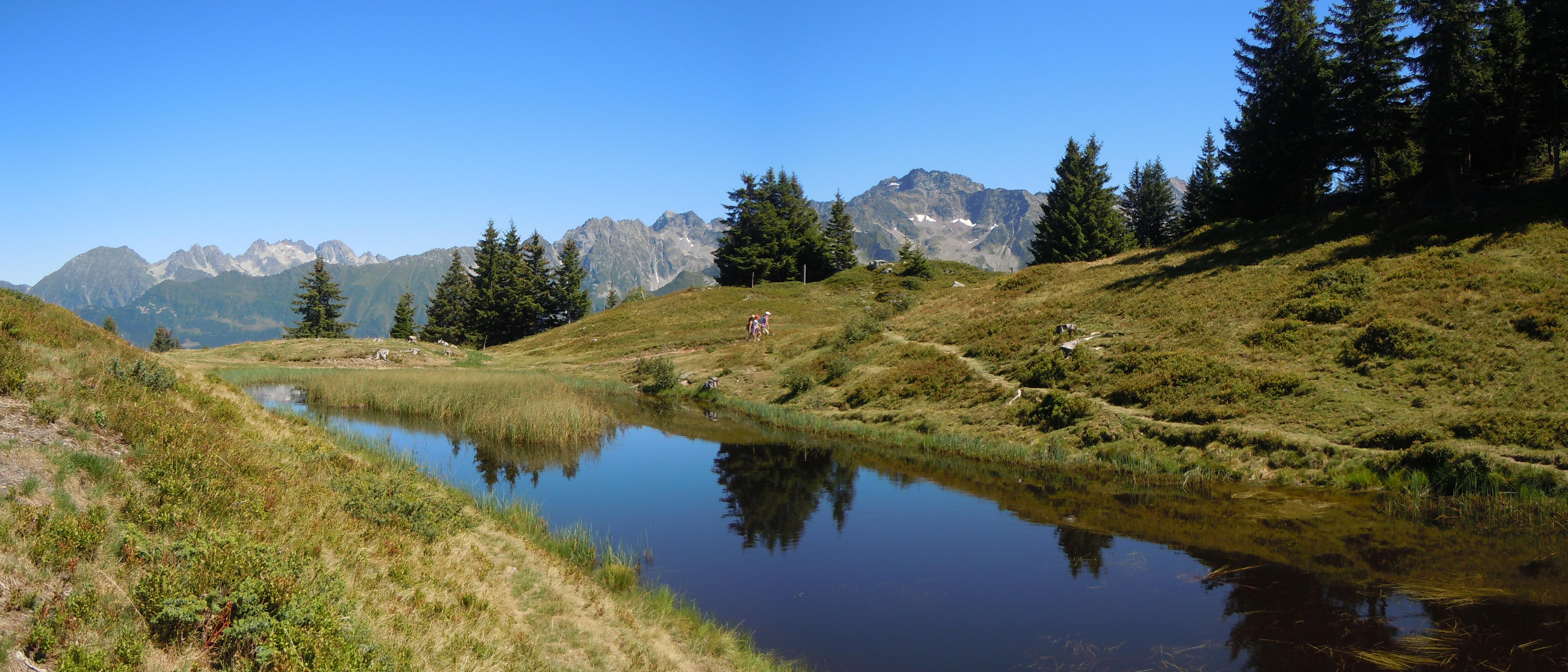 Lac de la Belle Aiguette - altitude 1745m - Crêt Luisard - belledoenne - Isère - France